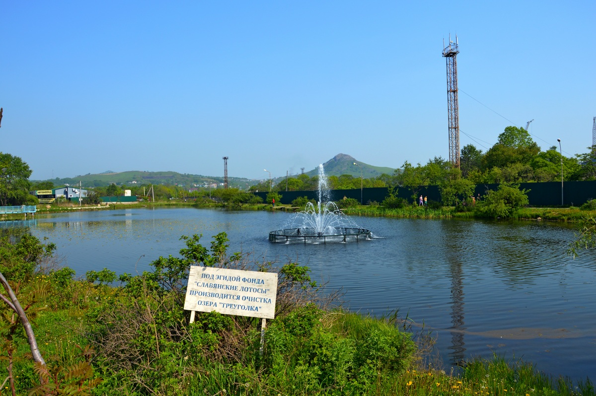 Достопримечательность поселка Славянка - озеро Треуголка